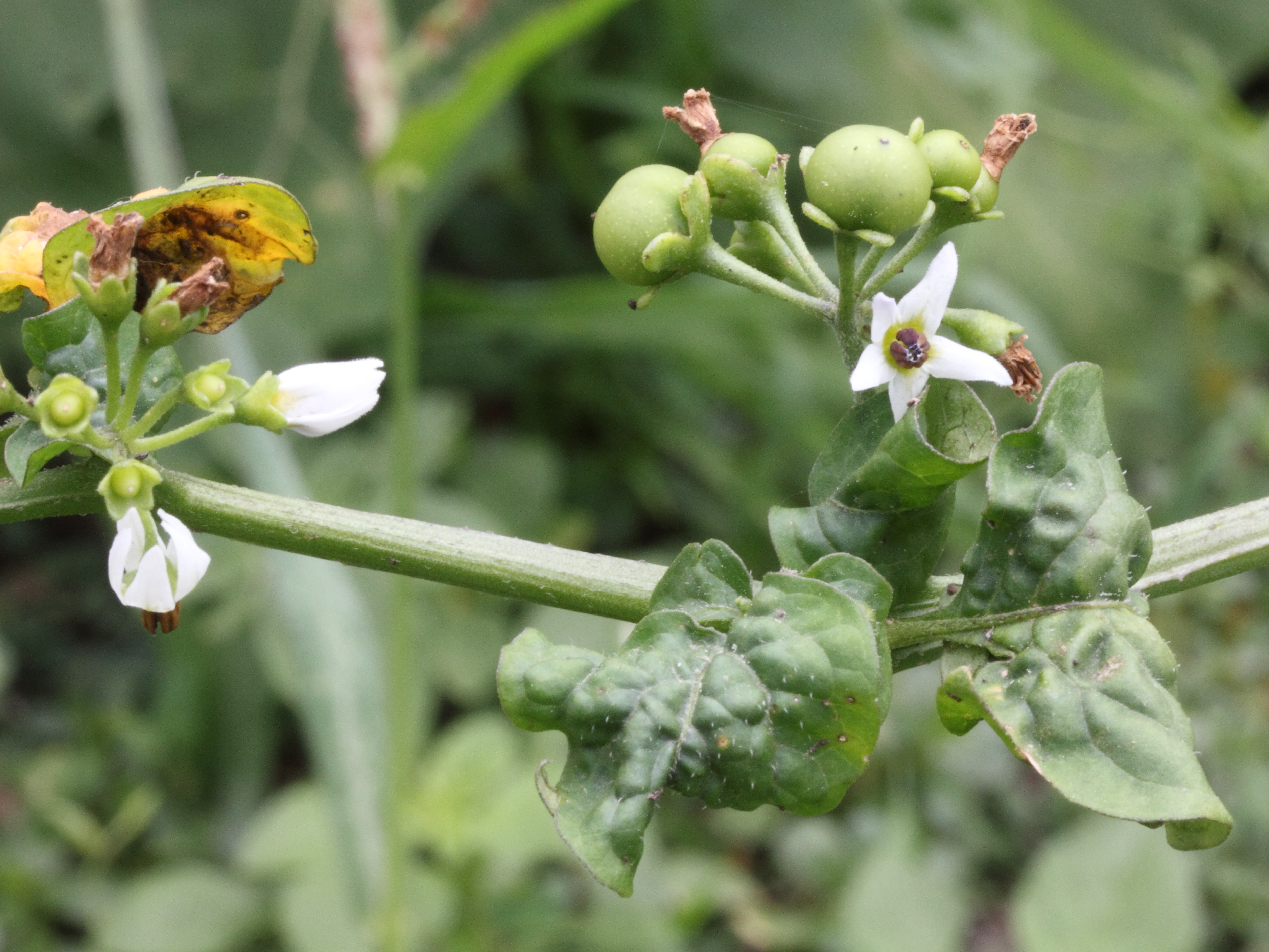 Muséum de Toulouse Native nameMuséum de ToulouseLocationToulouse , FranceCoordinates43° 35′ 38″ N, 1° 26′ 57″ E Established1796: established ; 1865: opened to publicWeb page control : Q422 VIAF: 130895847 ISNI: 0000 0001 2158 3469 SUDOC: 028667107 BNF: 120455376 Museofile: M7013 institution QS:P195,Q422